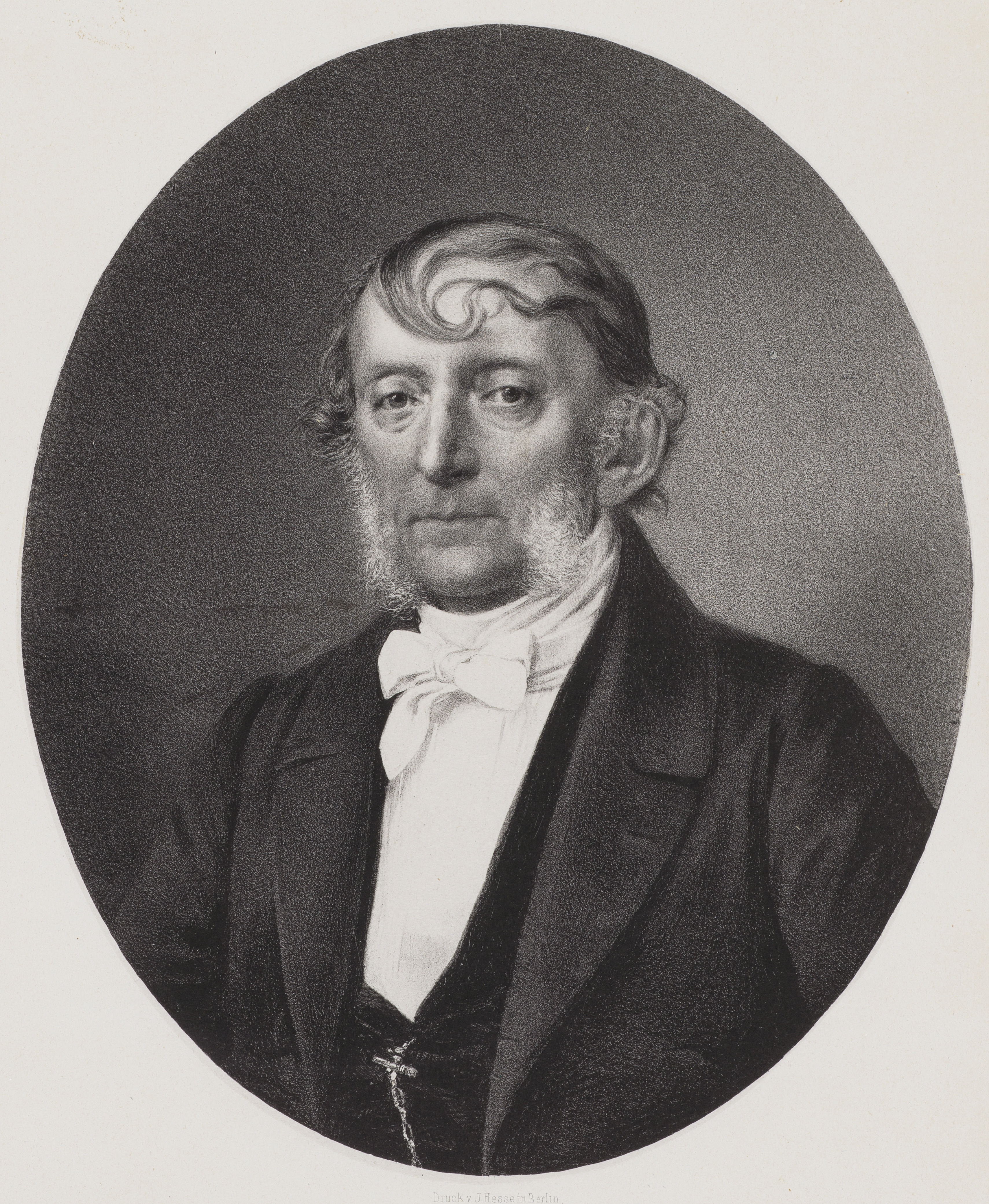 Bildnis von Heinrich Geffcken